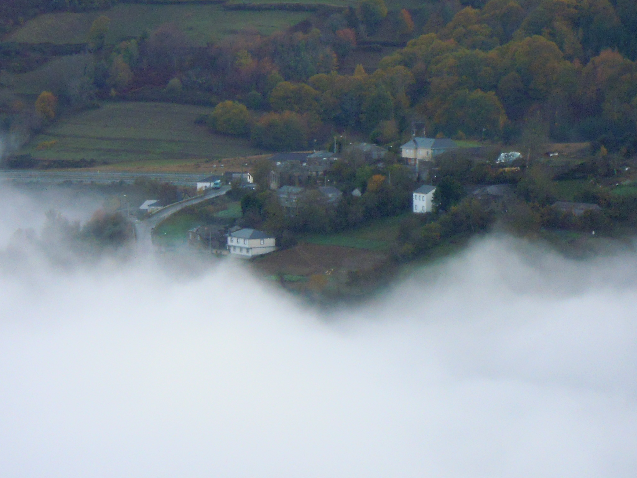 Vista da aldea de Espariz (As Nogais), sobre o val do río Navia nunha mañá de néboa. Imaxe tomada desde Chan de Vilar.